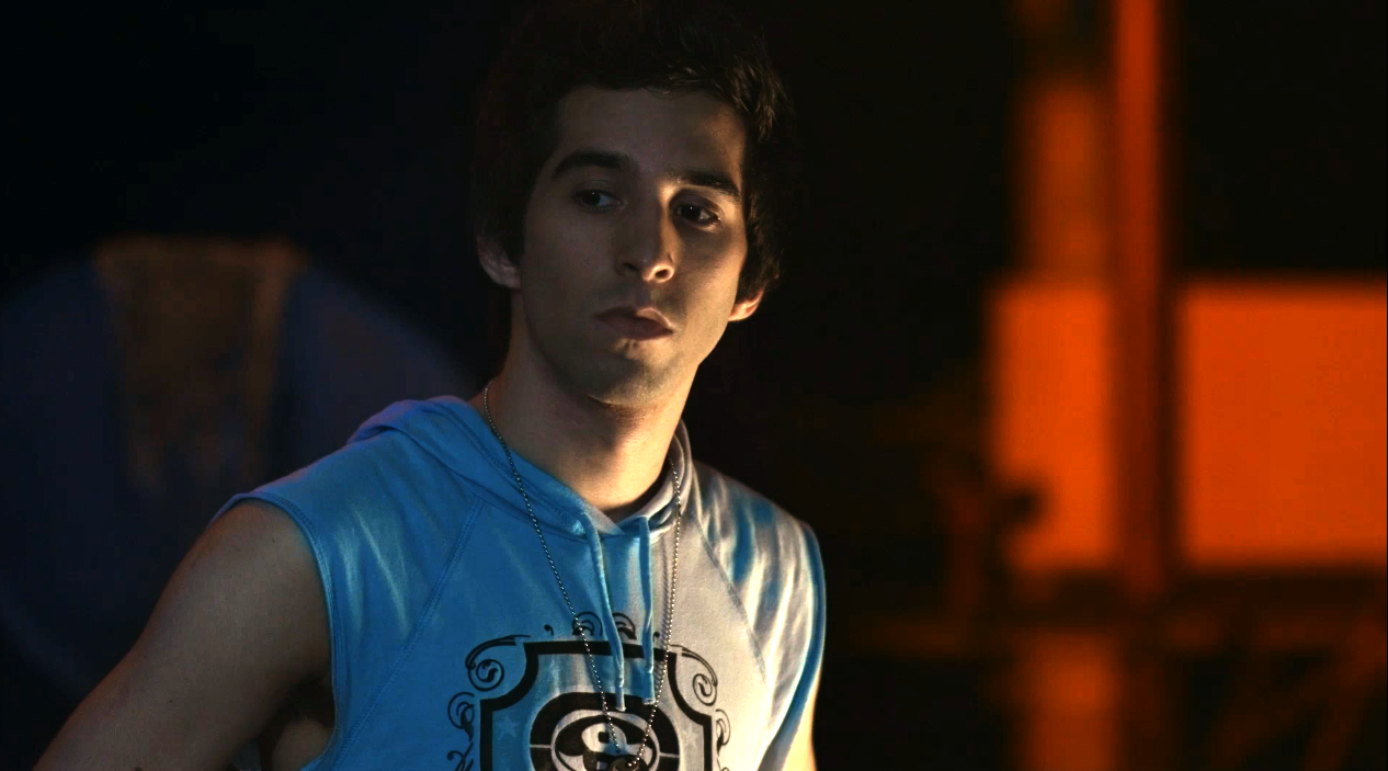 Mateus Ribeiro gravando o piloto da série A CHANCE